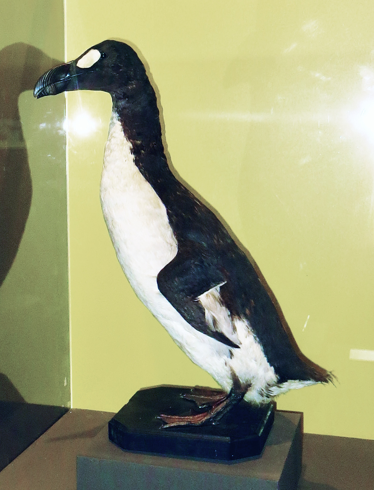 Great auk - Took the picture at MUSE, Trento